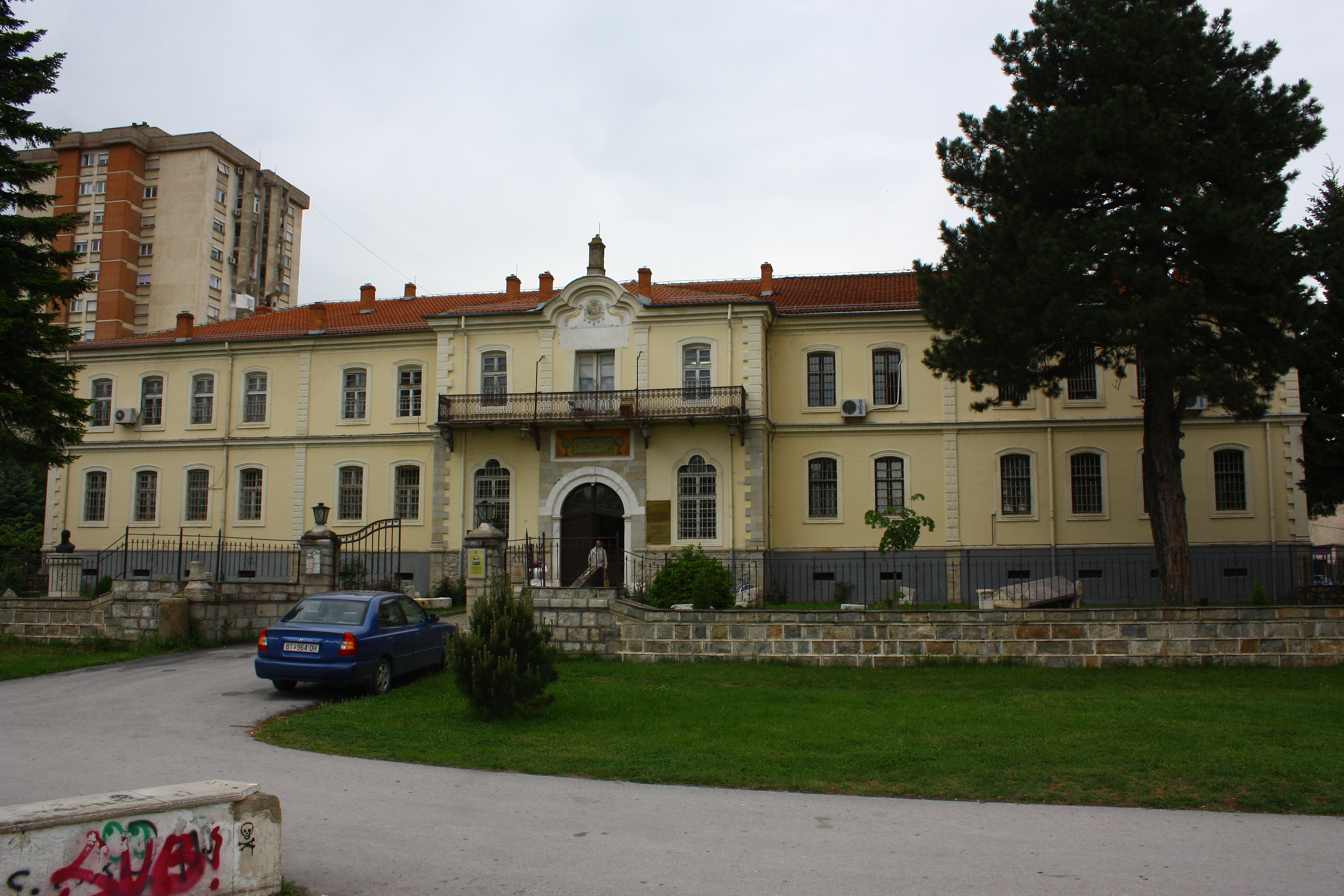 Музејот во Битола